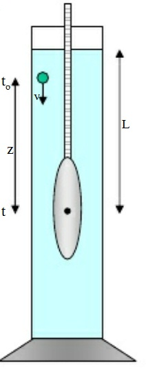 imatge hidrometria